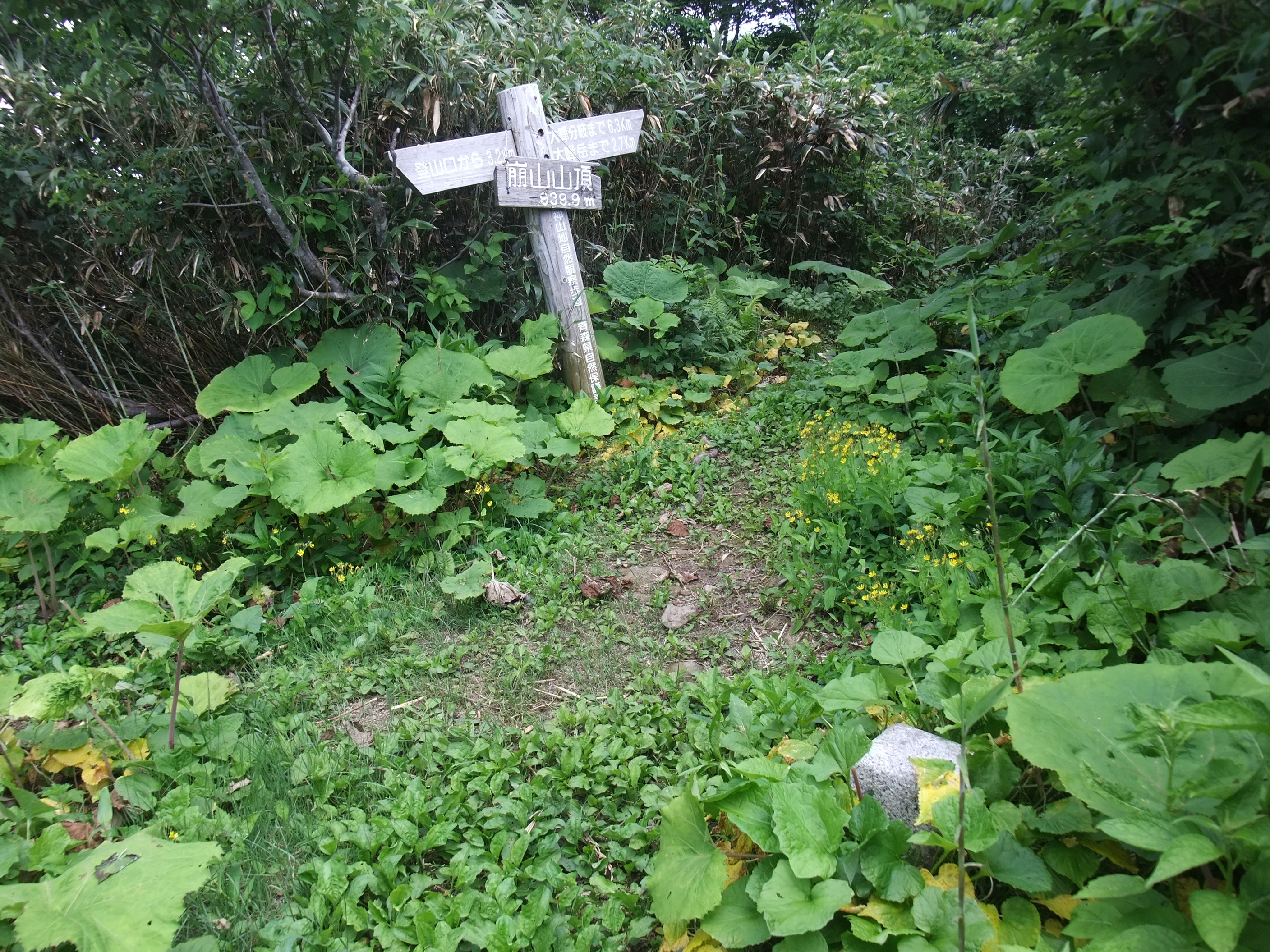 白神山地・崩山山頂